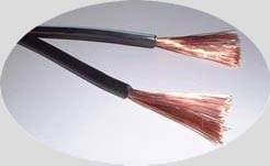 luidsprekerkabel, eigen foto